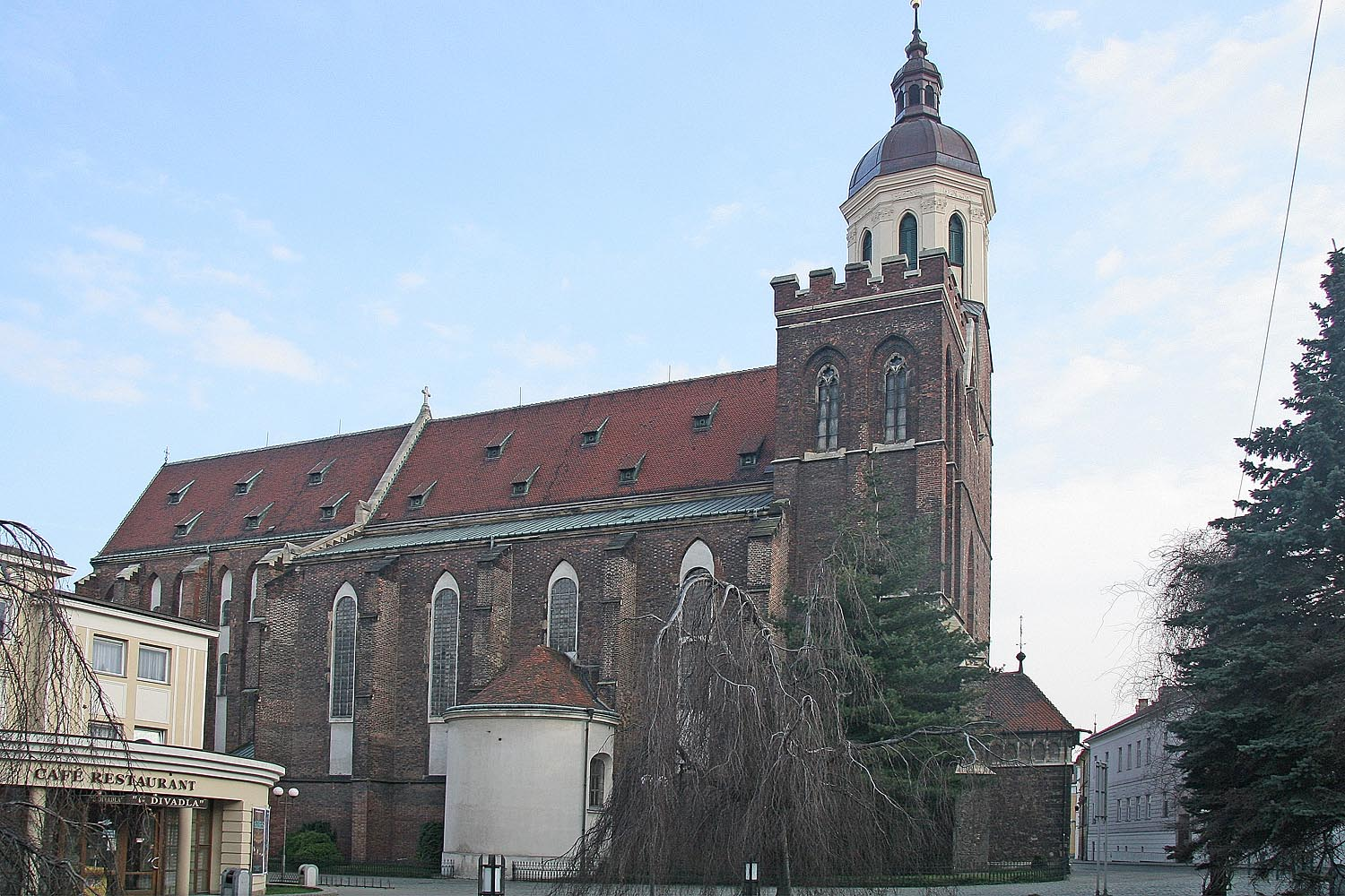 Katedrála Nanebevzetí Panny Marie v Opavě, district Opava, Czech Republic